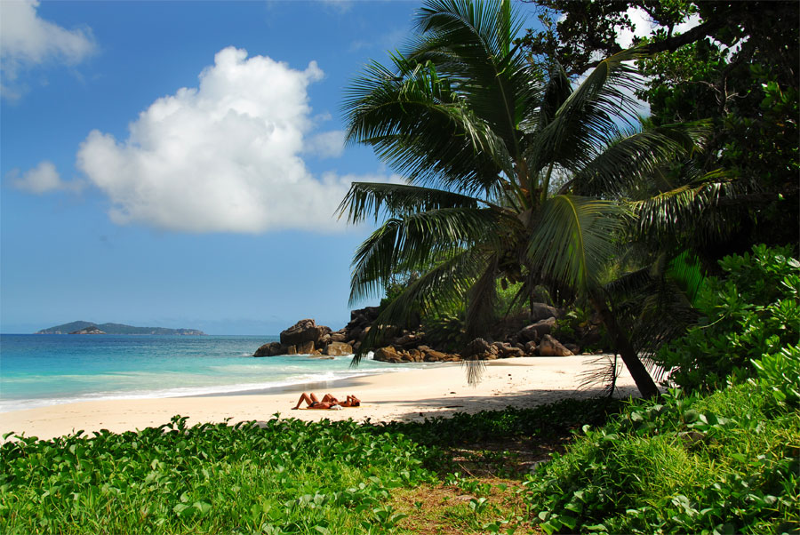 Rudy Bockaert en Françoise Gossey Seychellen 2006 Praslin: Anse Georgette